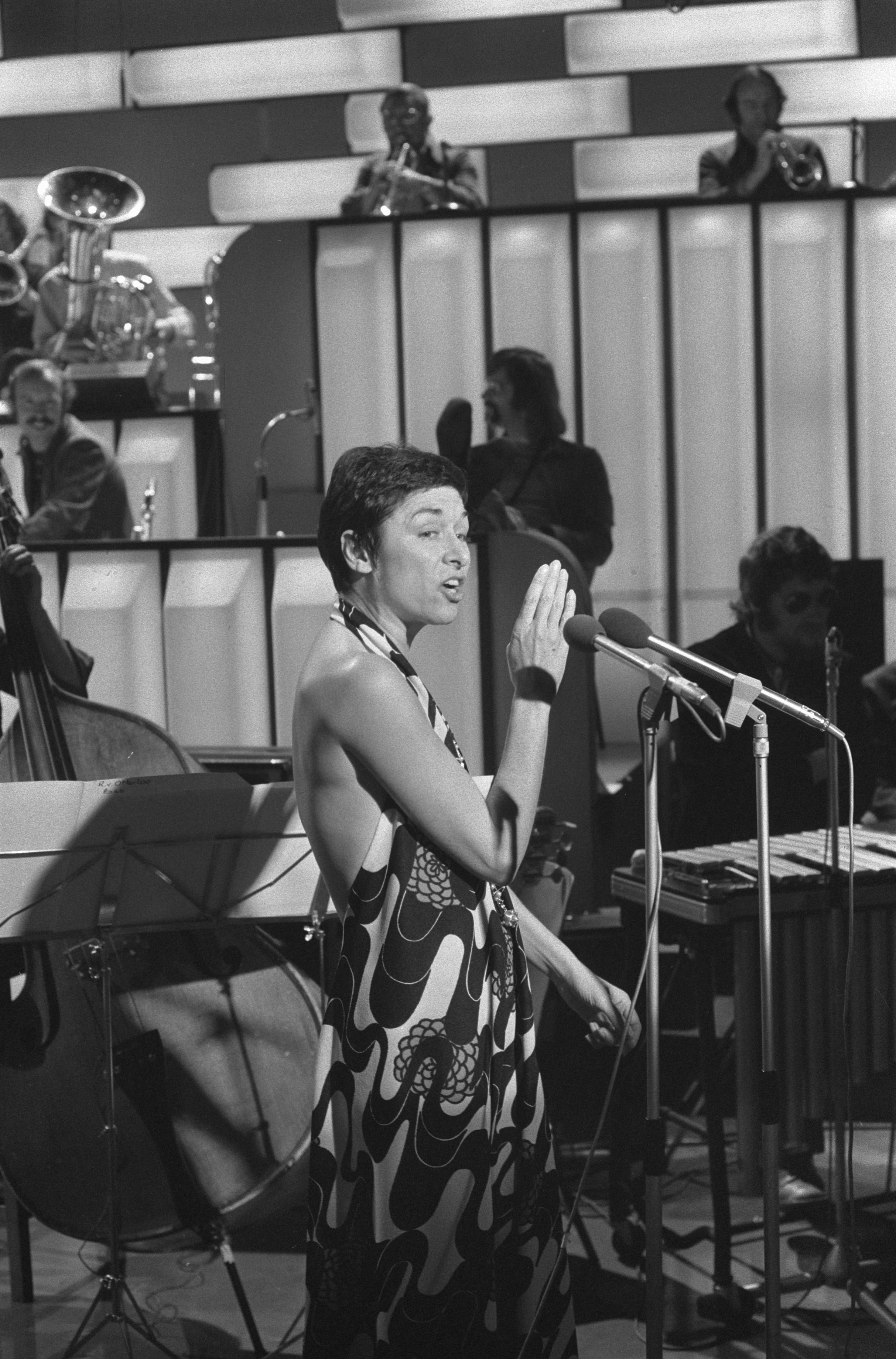 Collectie / Archief : Fotocollectie Anefo Reportage / Serie : [ onbekend ] Beschrijving : "Nederpopzien", Catherine Sawage (Frankrijk) Datum : 9 april 1974 Trefwoorden : muziek Fotograaf : Punt, […] / Anefo Auteursrechthebbende : Nationaal Archief Materiaalsoort : Negatief (zwart/wit) Nummer archiefinventaris : bekijk toegang 2.24.01.05 Bestanddeelnummer : 927-1202